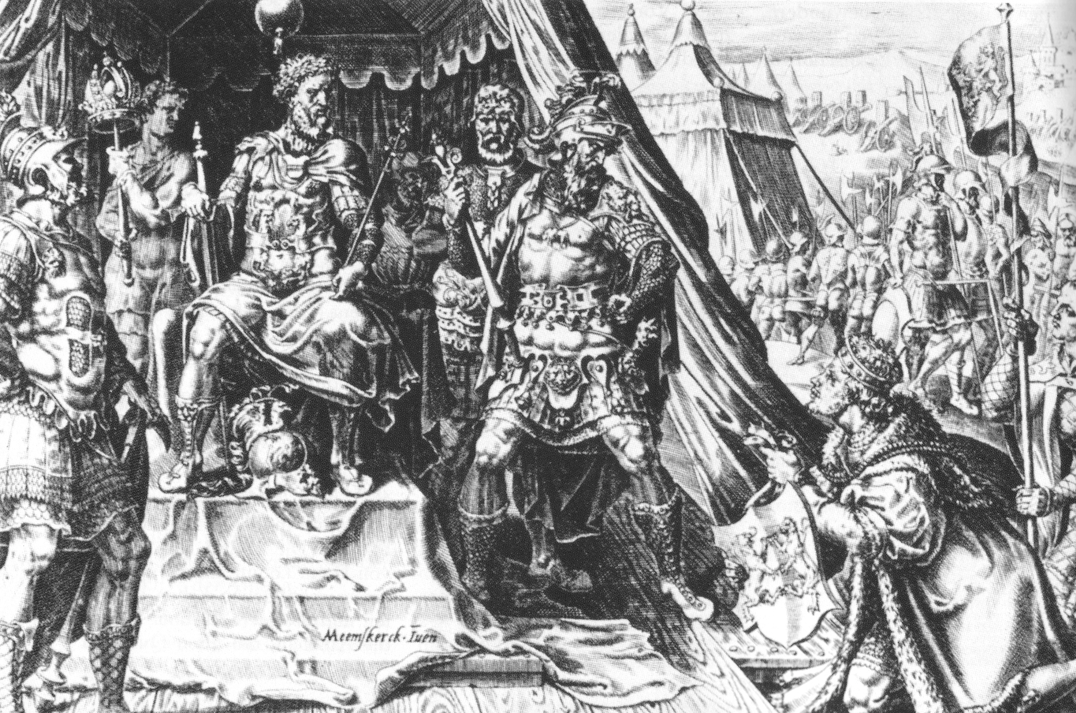 Wilhelm V. von Jülich-Cleve-Berg fällt 1543 in Venlo Kaiser Karl V. auf die Knie